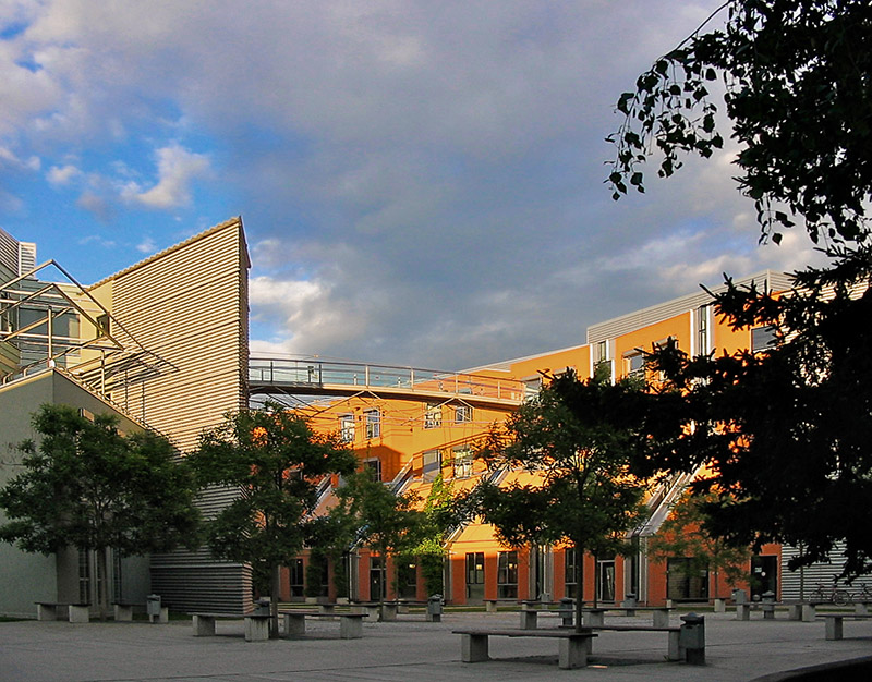 TU Graz - Mensa in der Infeldgasse